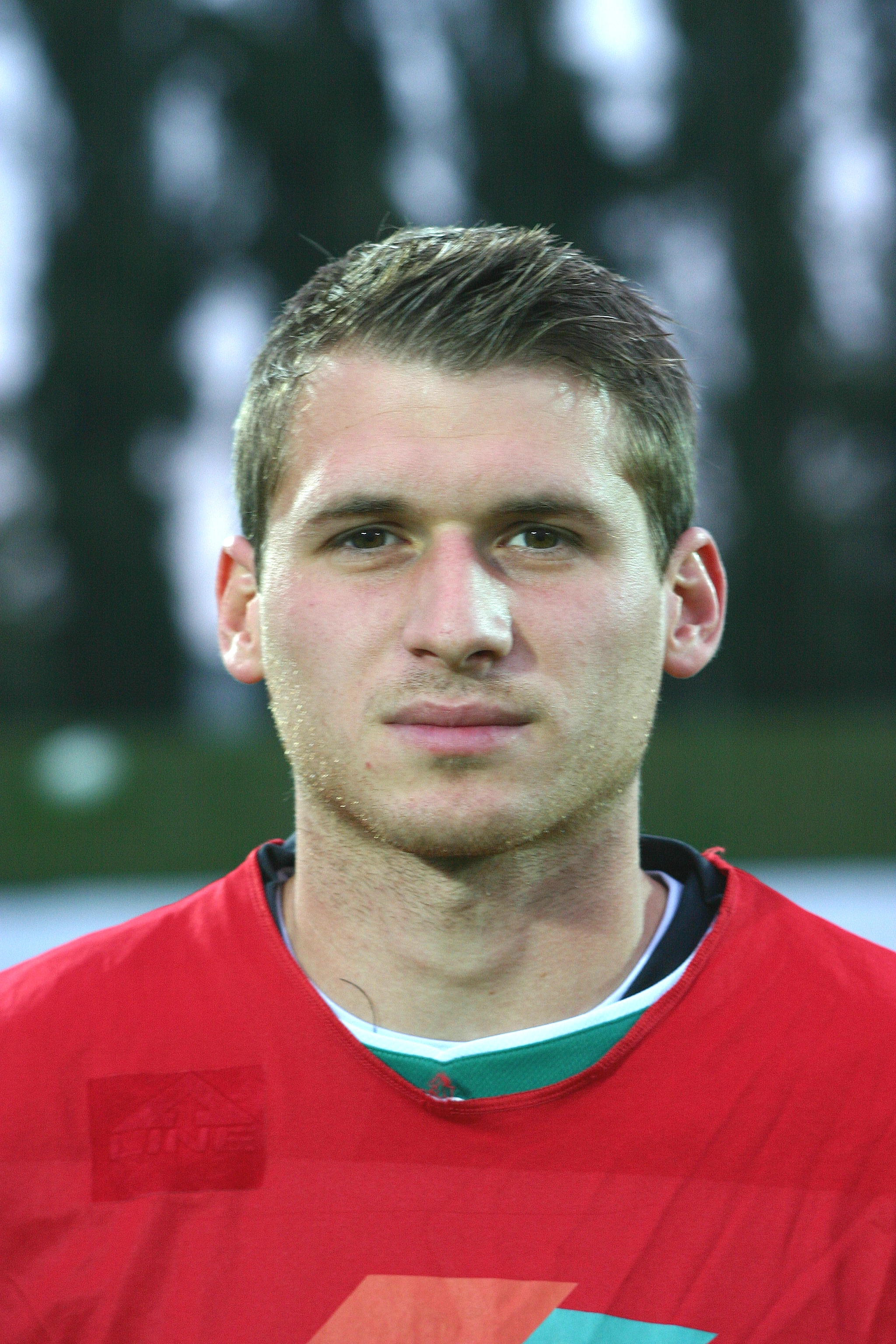 Thomas Friess (DSV Leoben)